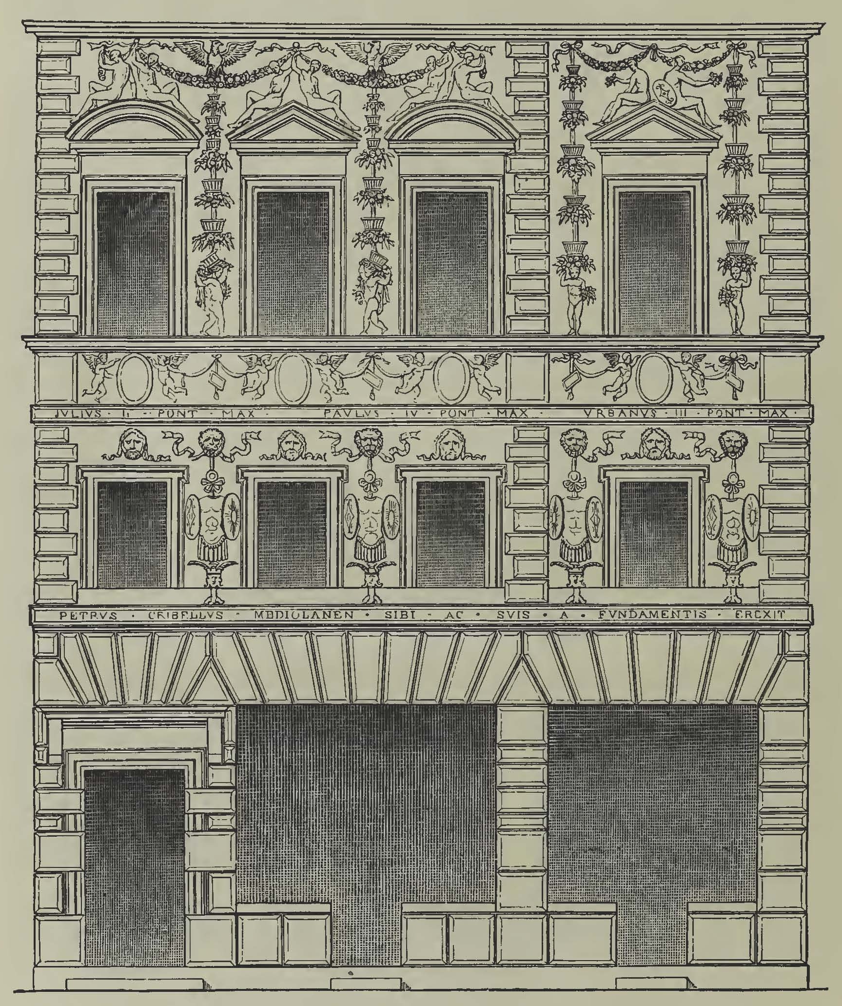 Sgraffitofassade mit Trophäen in der Via Santa Lucia in Rom, 1855.